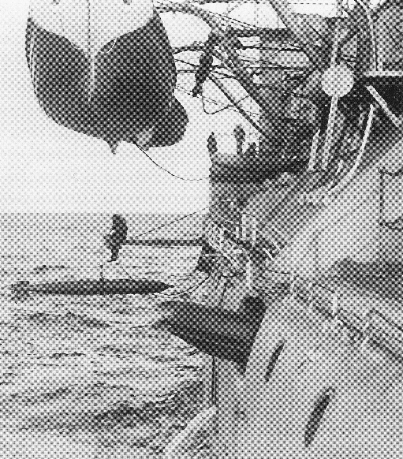 Ein Torpedo wird an Bord eines Linienschiffs der Brandenburg-Klasse genommen. Mittig das vordere Backbord-Breitseittorpedorohr.